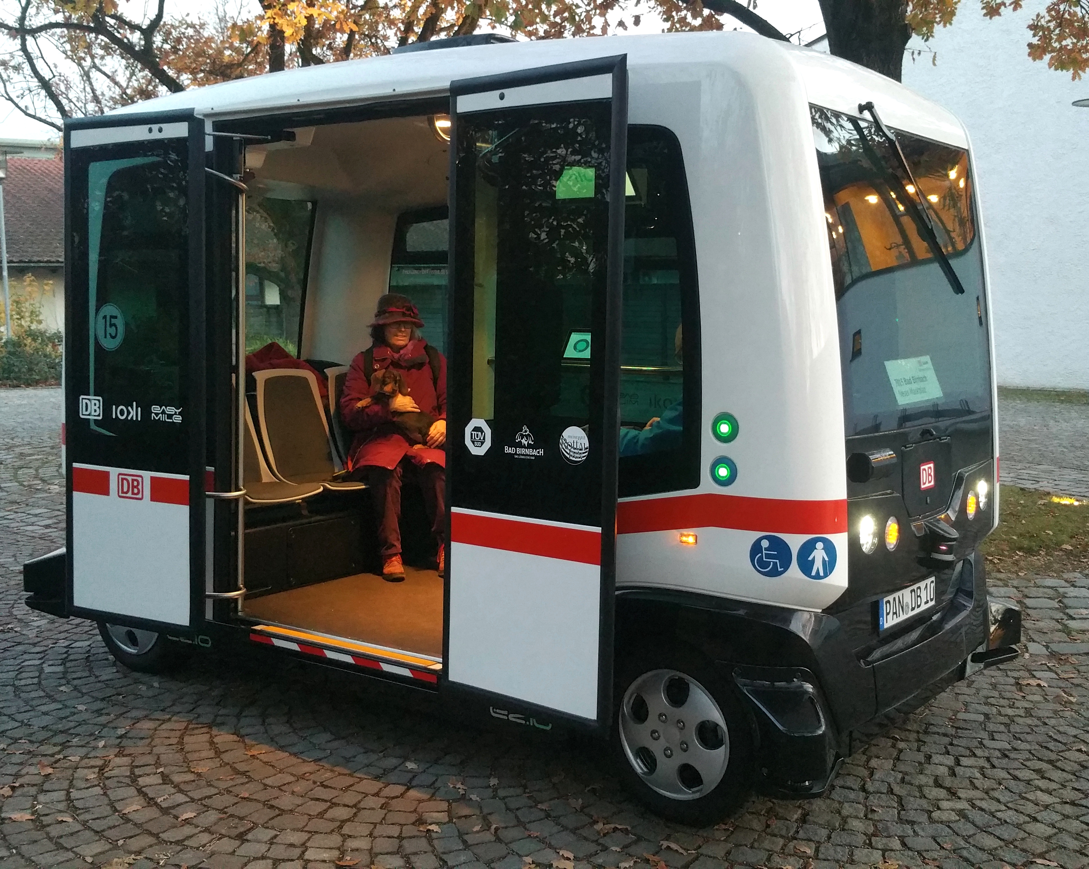 Deutschland, Bayern, Landkreis Rottal-Inn, Bad Birnbach, Autonomes Fahren mit dem Elektrobus vom Neuen Marktplatz zur Rottal Terme im Oktober 2017